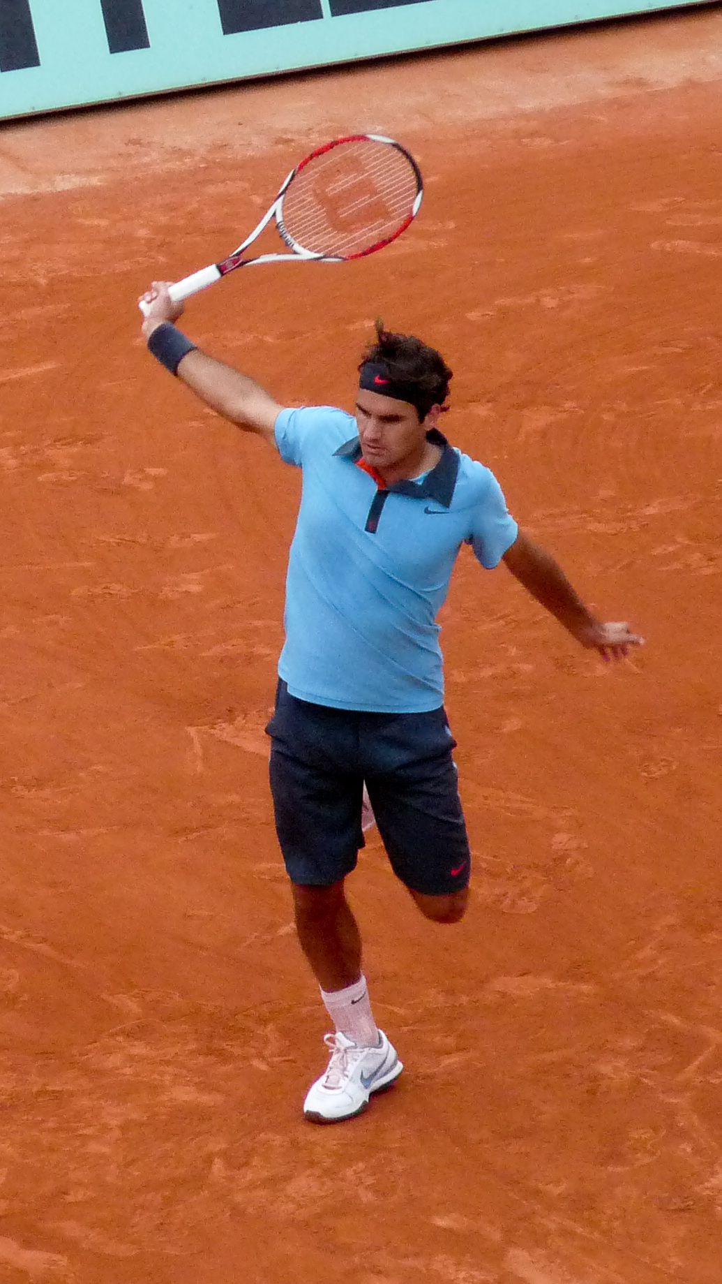 Roger Federer against Juan Martín del Potro in the 2009 French Open semifinals